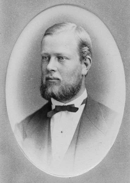 Affärsmannen och grosshandlaren Theodor Nygren